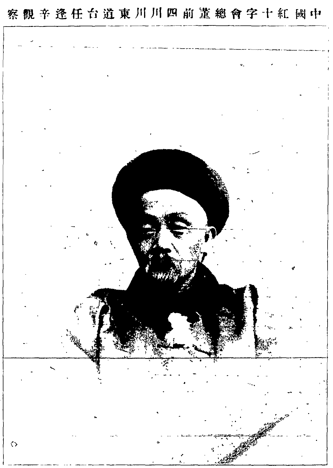 中文（台灣）: 《大同報(上海)》 1908年[ 第九卷第17期 ，1頁]